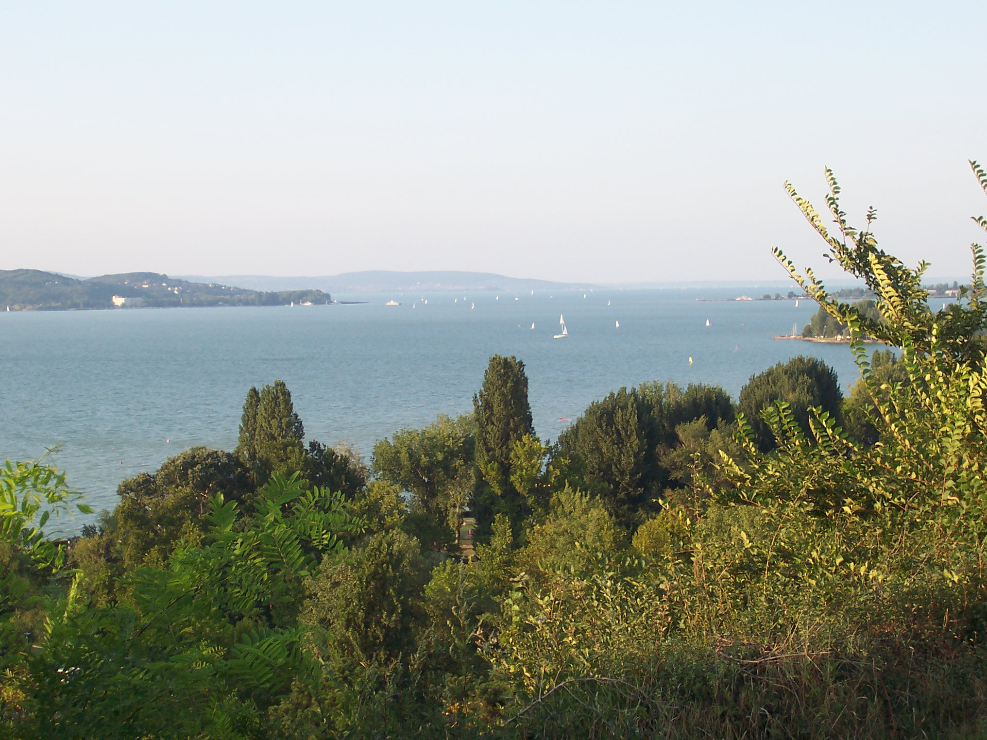 Balatonföldvár.Homokfal tetejéröl